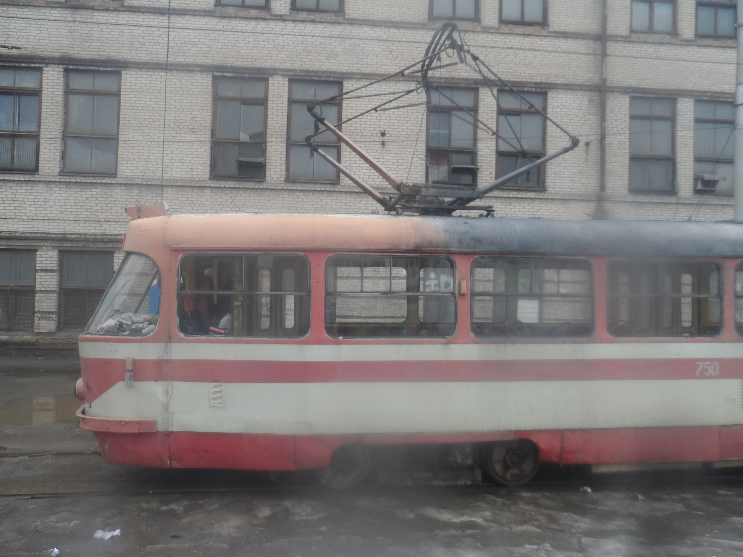 В Запорожье